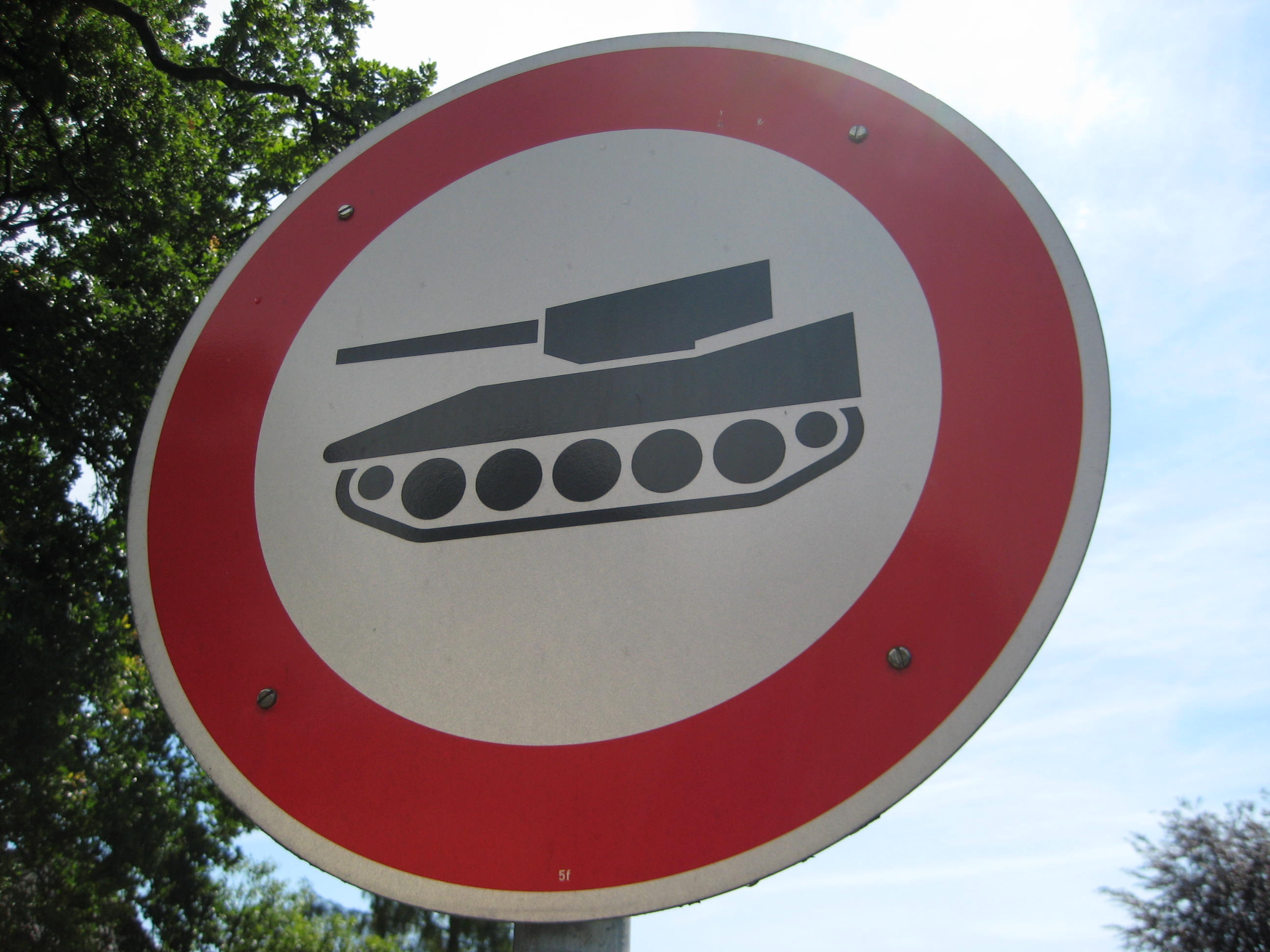 Verbotsschild in Hellwege